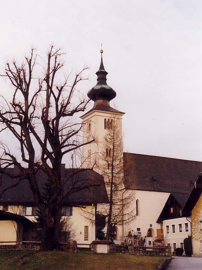 Kath. Pfarrkirche hl. Stephan